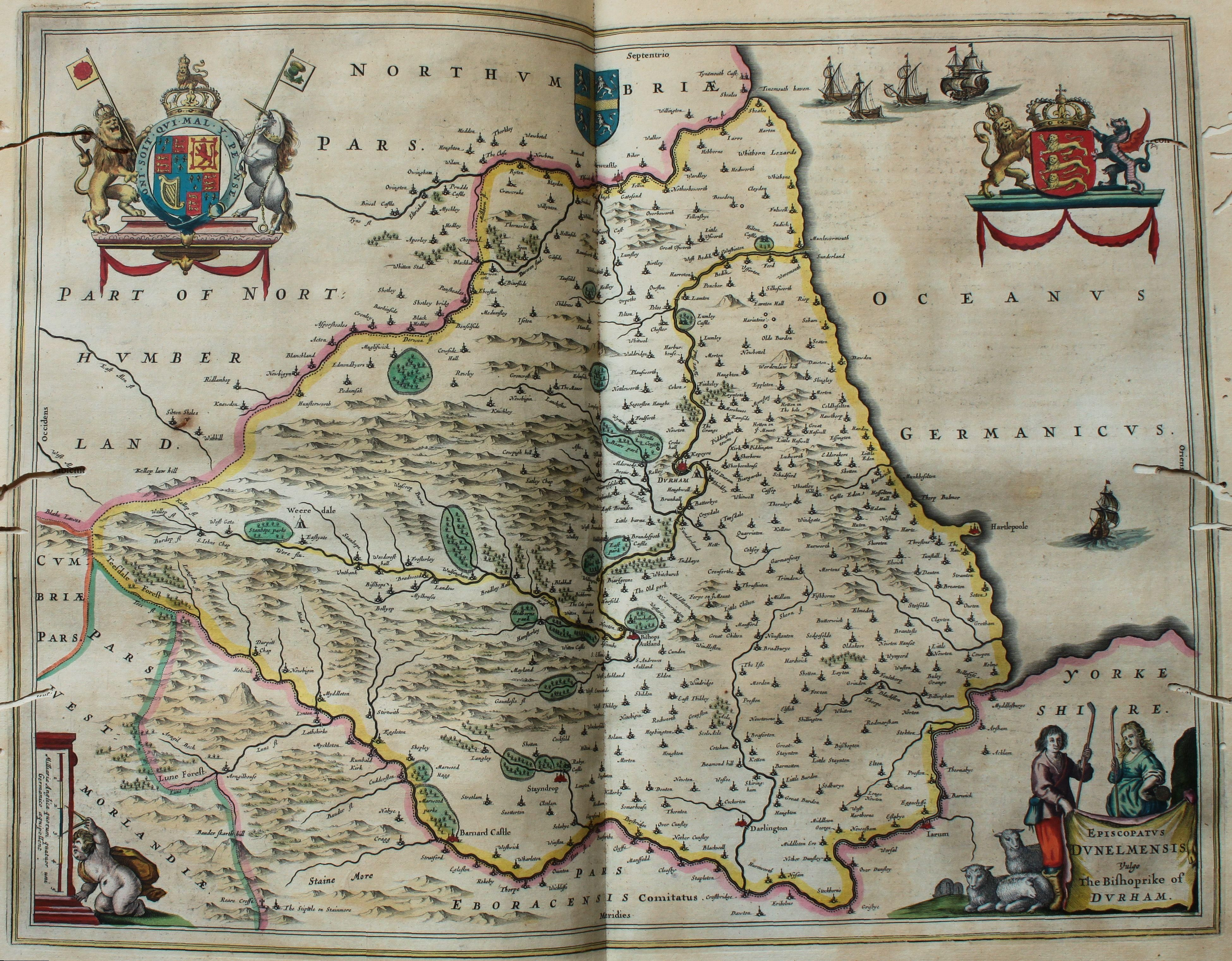 Descripción bibliográfica: Geographia Blaviana. - [Amsterdam : Juan Blaeu, 1659] . - [32], VI, 96 p., 34 f., h. 35a, 35b, 35c, 35d, 36-44 f., 34, [2], 36-40, [2], 43-70 [i. e. 75], [1] f., [20] p. de map., [9] f. de map., [4] f. pleg. de map., [2] f. de plan., [2] f. ge grab. : |bil. ; |cFol. marca major (57 cm.) . - En la dedicatoria a Felipe IV: "Presenta ... El Atlas Universal y Cosmographico de los orbes y terrestre ... Juan Blaeu" . - Título tomado del frontispicio. -- Privilegio fechado en 1659. -Errores de pag. - Sign.: 1, *2, **3, ***-****2, a-e2, A-I2, K1, L-Z2, Aa-Dd2, 4 2, Ee-Ff2, A-I2, K1, L2, M1, N-Y2, Z5, Aa-Dd2, Ee1, A-D2, E-F1, G-I2, K-L1, M-O2, P1, Q-Z2, Aa-Bb2, Cc1, Dd3, Ff-Zz2, Aaa-Bbb2, . - Frontispicio grab. col. -- Incluye un total de 49 il. entre map., plan. i grab. Materia: Atlas - Obras anteriores a 1800 Impresor: Blaeu, Joan, 1596-1673, imp. Lugar de impresión: Holanda. Amsterdam Localización: Vea la ilustración en su contexto Visite también la exposición "Cartografía histórica en la Biblioteca de la Universidad de Sevilla"